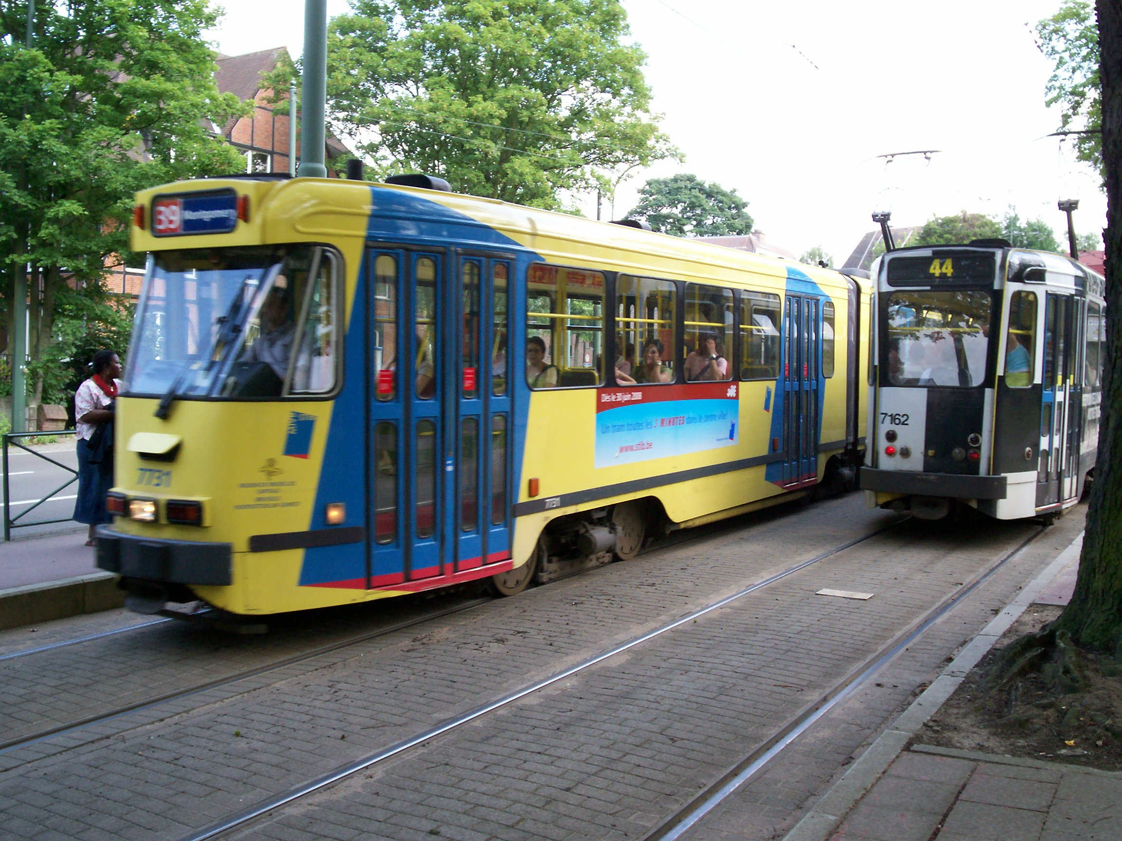 Un tram de la ligne 39 à Madoux et en direction de Montgomery